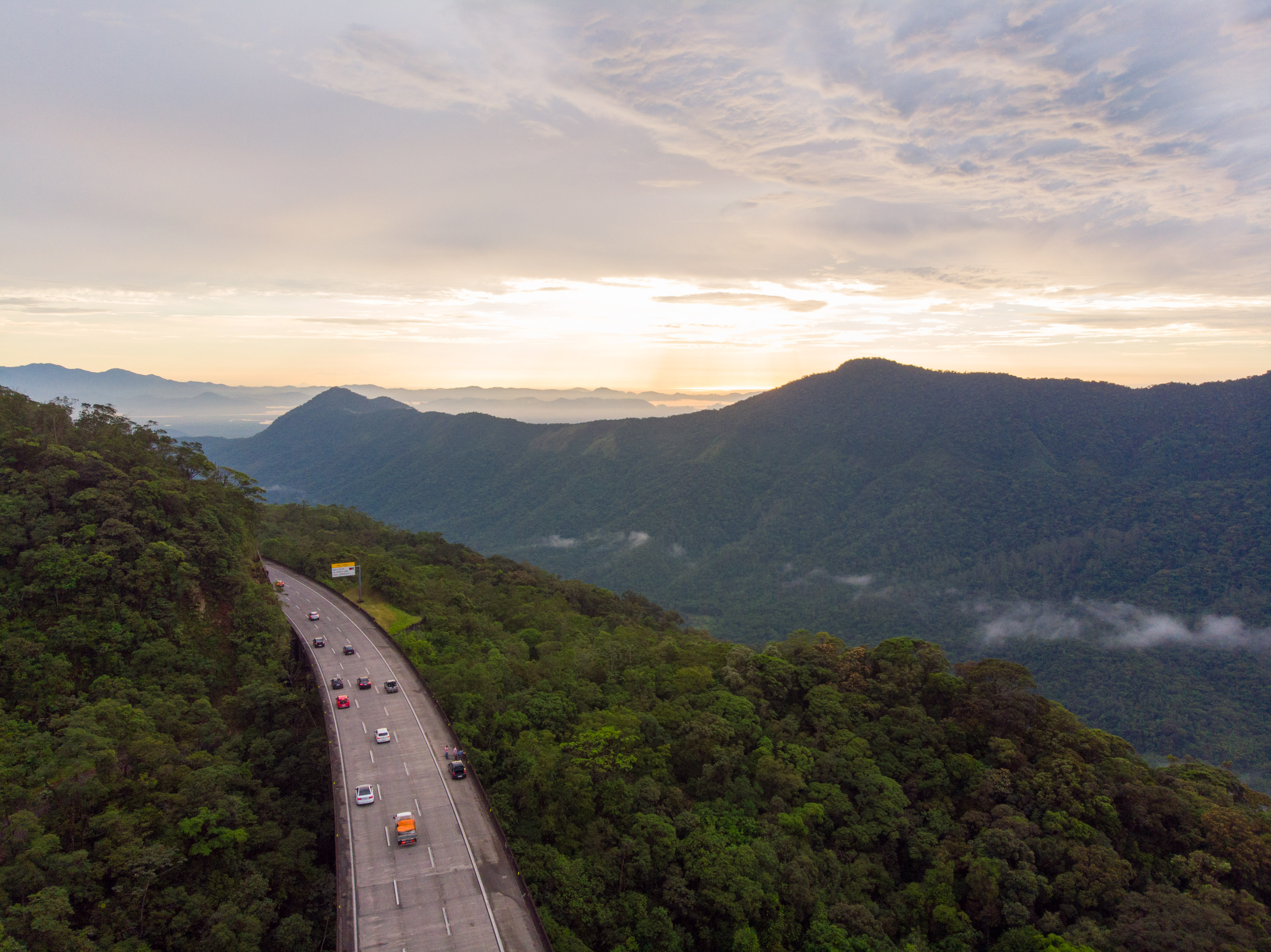 O governador Márcio França, participa do Início da Operação Verão no Guarujá, Litoral Paulista Local: São Paulo/SP Data: 19/12/2018. Foto: Governo do Estado de São Paulo